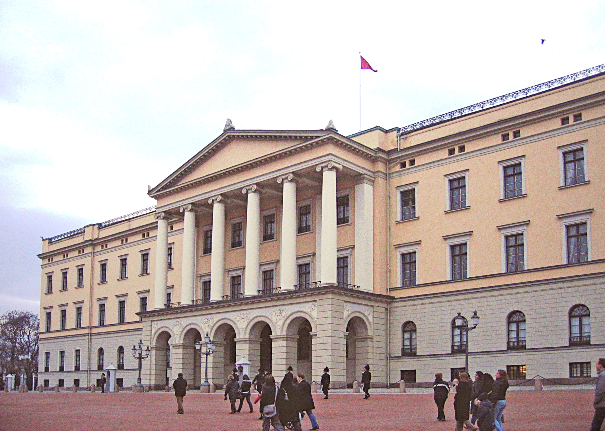 Kinneklecht Schlass zu Oslo